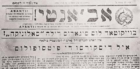 Главата на вестник "Аванти" (1922).